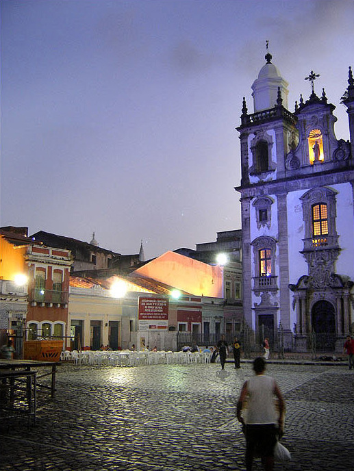 Pátio de São Pedro, Recife, Pernambuco, Brasil, vendo-se parte da Concatedral de São Pedro dos Clérigos